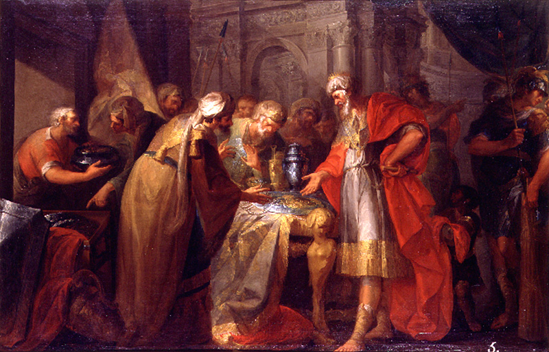 El lienzo representa a Ezequías, rey de Judá, haciendo ostentación de sus riquezas ante los legados del rey de Babilonia, pasaje descrito en la Biblia.